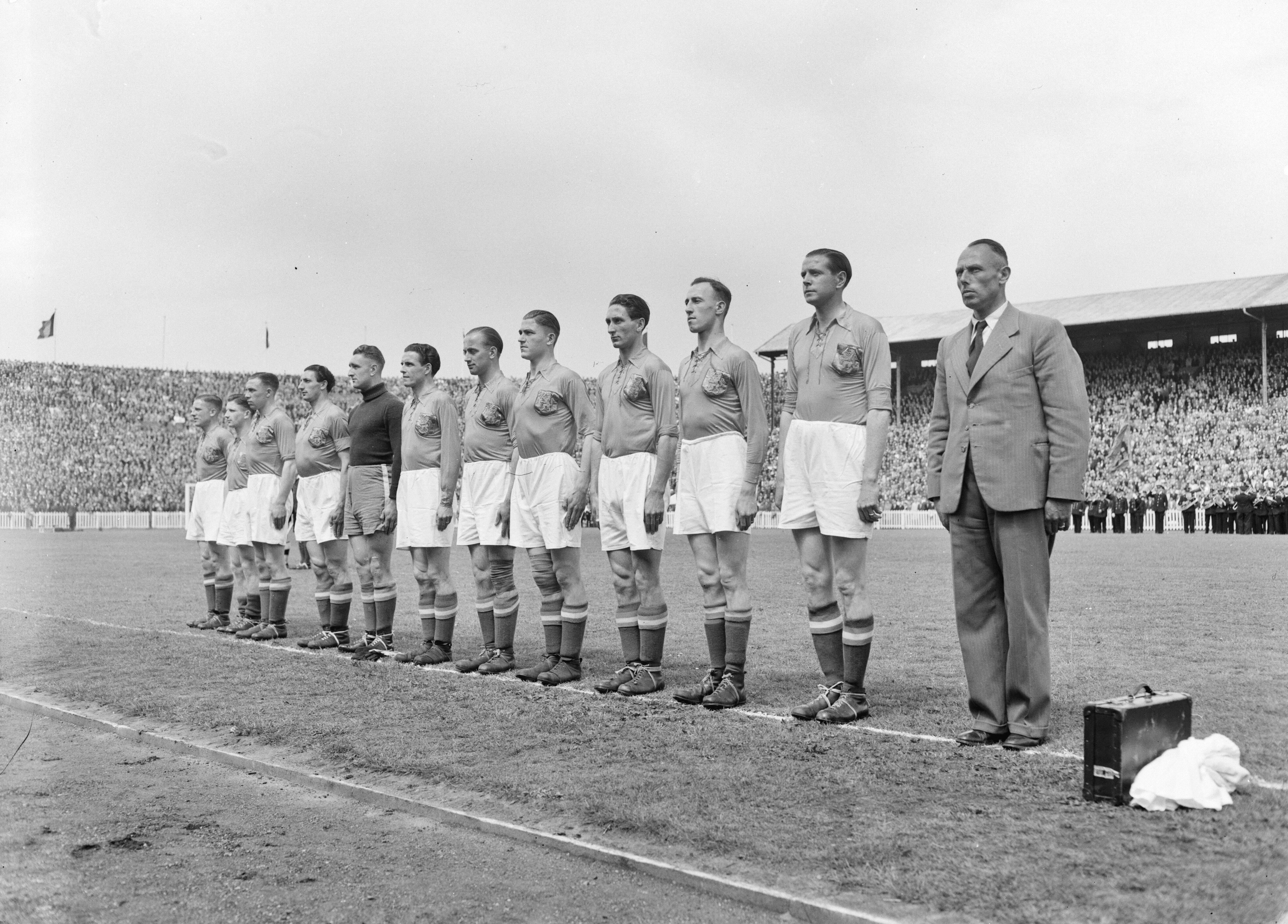 Collectie / Archief : Fotocollectie Anefo Reportage / Serie : [ onbekend ] Beschrijving : Belgie-Holland 2-2. Nederlandse Elftal Datum : 30 mei 1946 Locatie : Antwerpen Trefwoorden : elftallen, interlands, sport, voetbal Fotograaf : Raucamp, Koos / Anefo Auteursrechthebbende : Nationaal Archief Materiaalsoort : Negatief (zwart/wit) Nummer archiefinventaris : bekijk toegang 2.24.01.04 Bestanddeelnummer : 901-7791